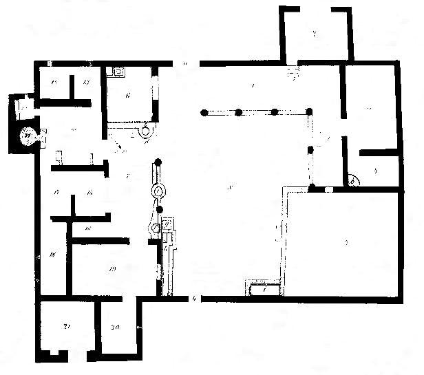 Pianta di Villa Medici disegnata da Francesco La Vega nel 1781